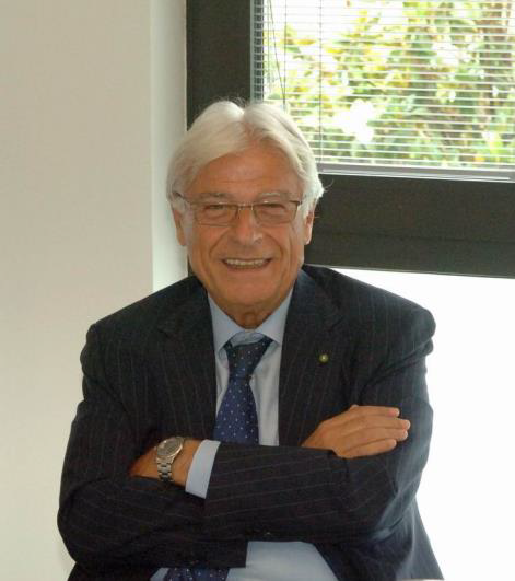 Marco Vacchi è un'imprenditore bolognese che ha avuto un ruolo fondamentale nella fondazione e crescita dell'azienda IMA Spa, leader mondiale nell'ambito del packaging